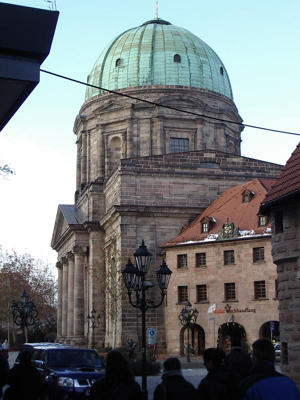 Nürnberg, Elisabethkirche, Südfassade von O (ca. 2003-12-17).